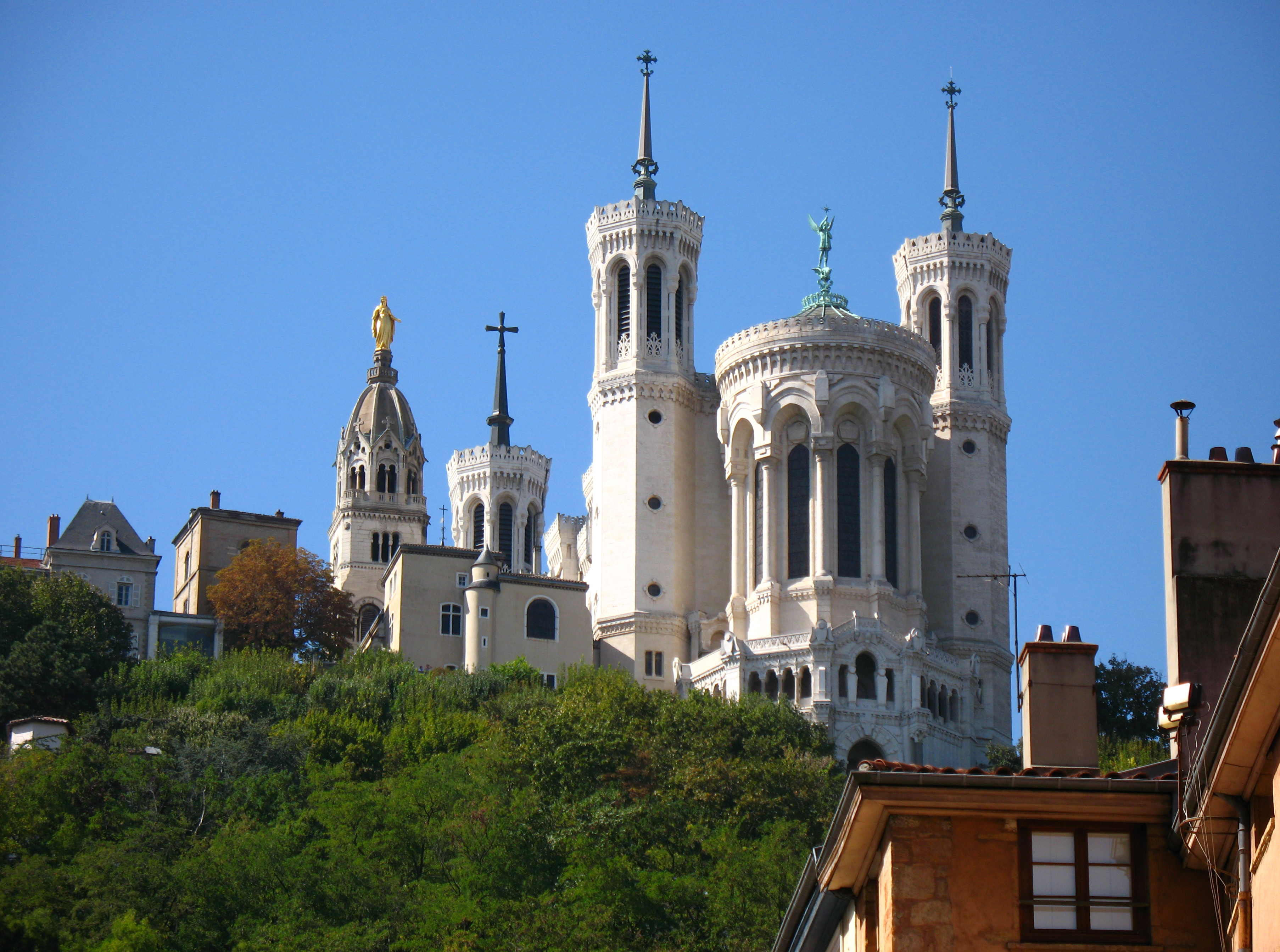 Fourvière as seen from Vieux Lyon